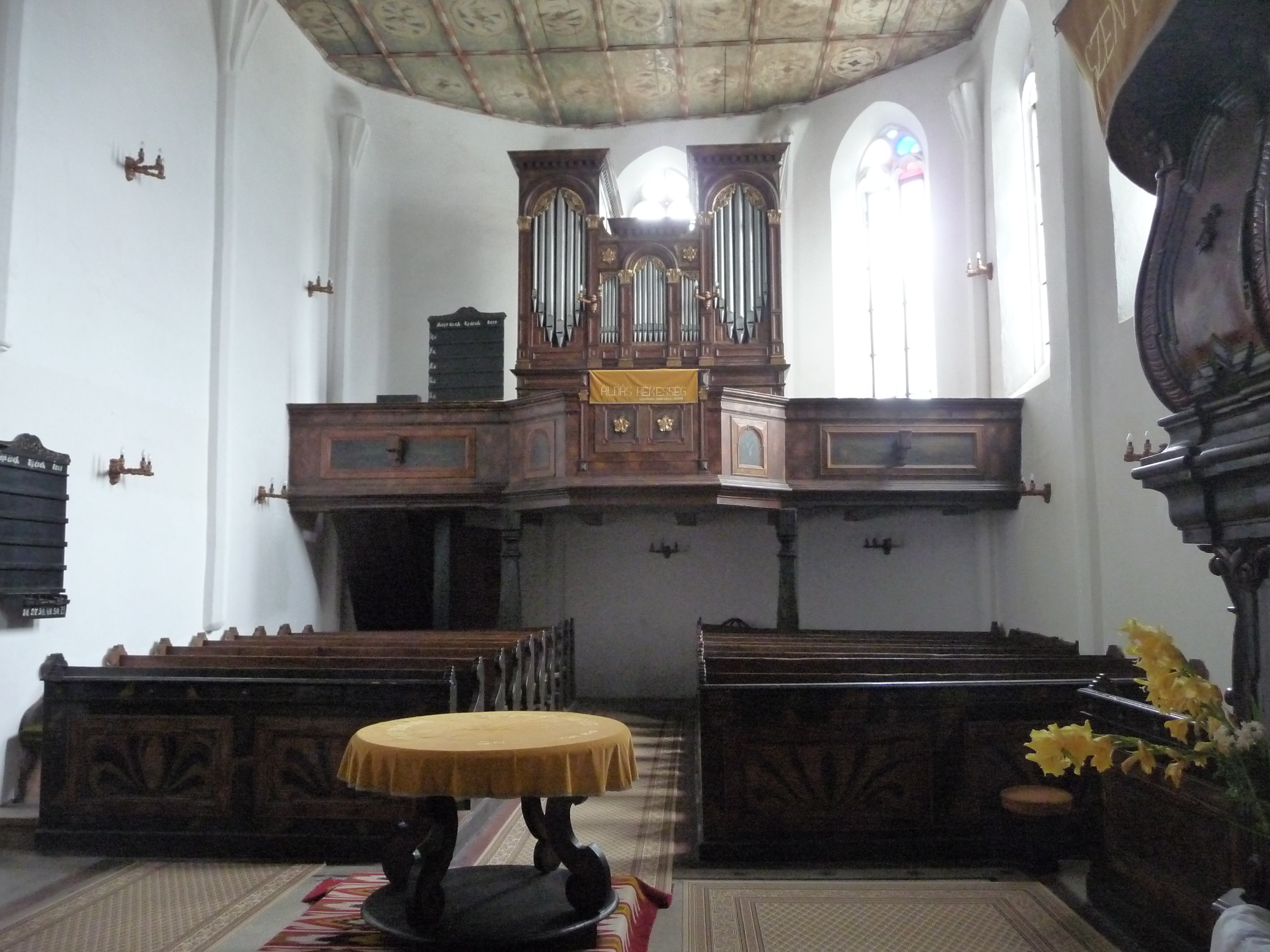 A sajószentpéteri református nagytemplom orgonája